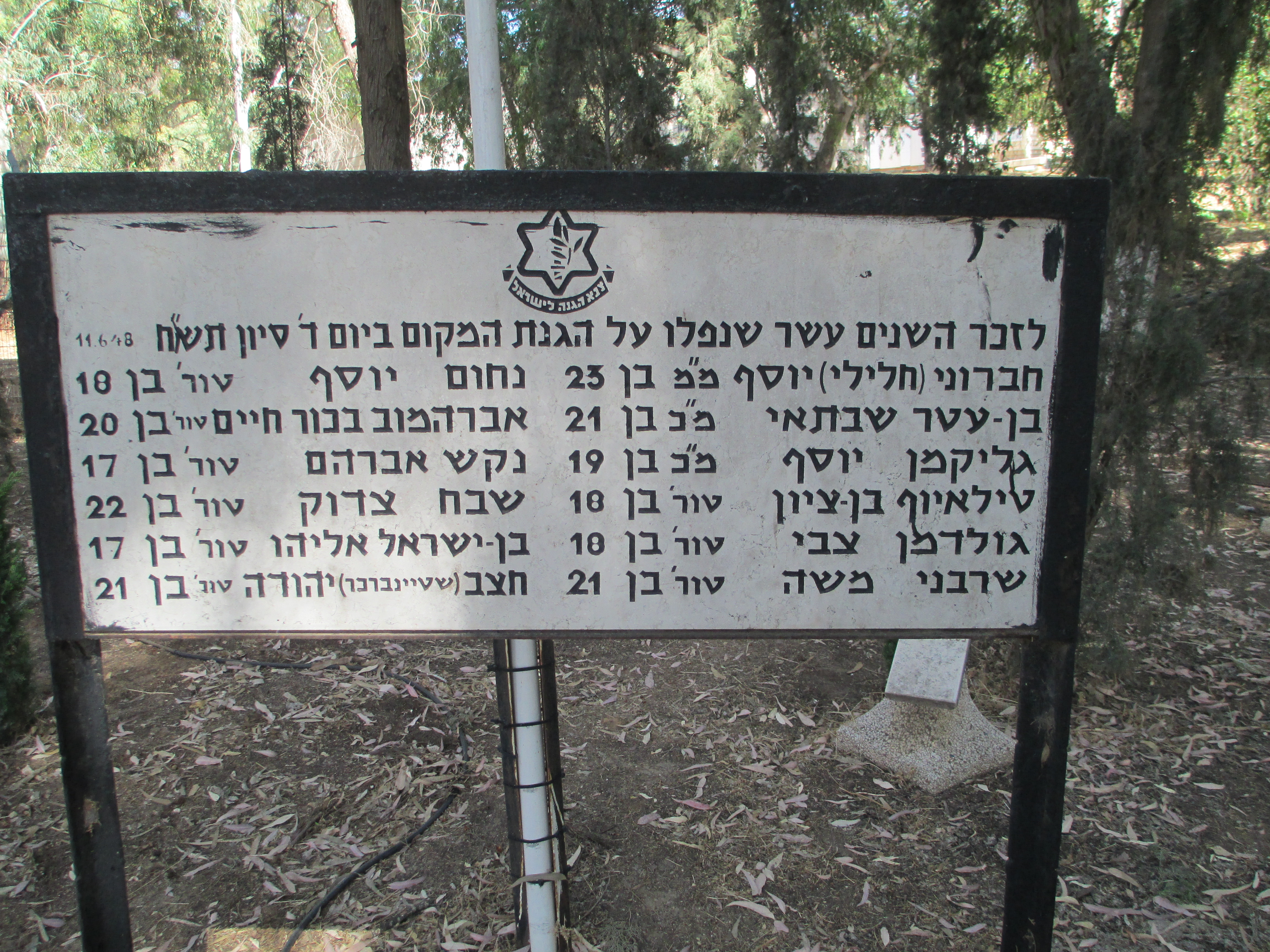 חורשת זיכרון לגדוד 42 בצריפין